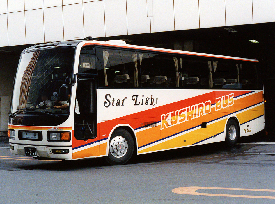 くしろバス スターライト釧路 三菱ふそう U-MS729S エアロクィーンM